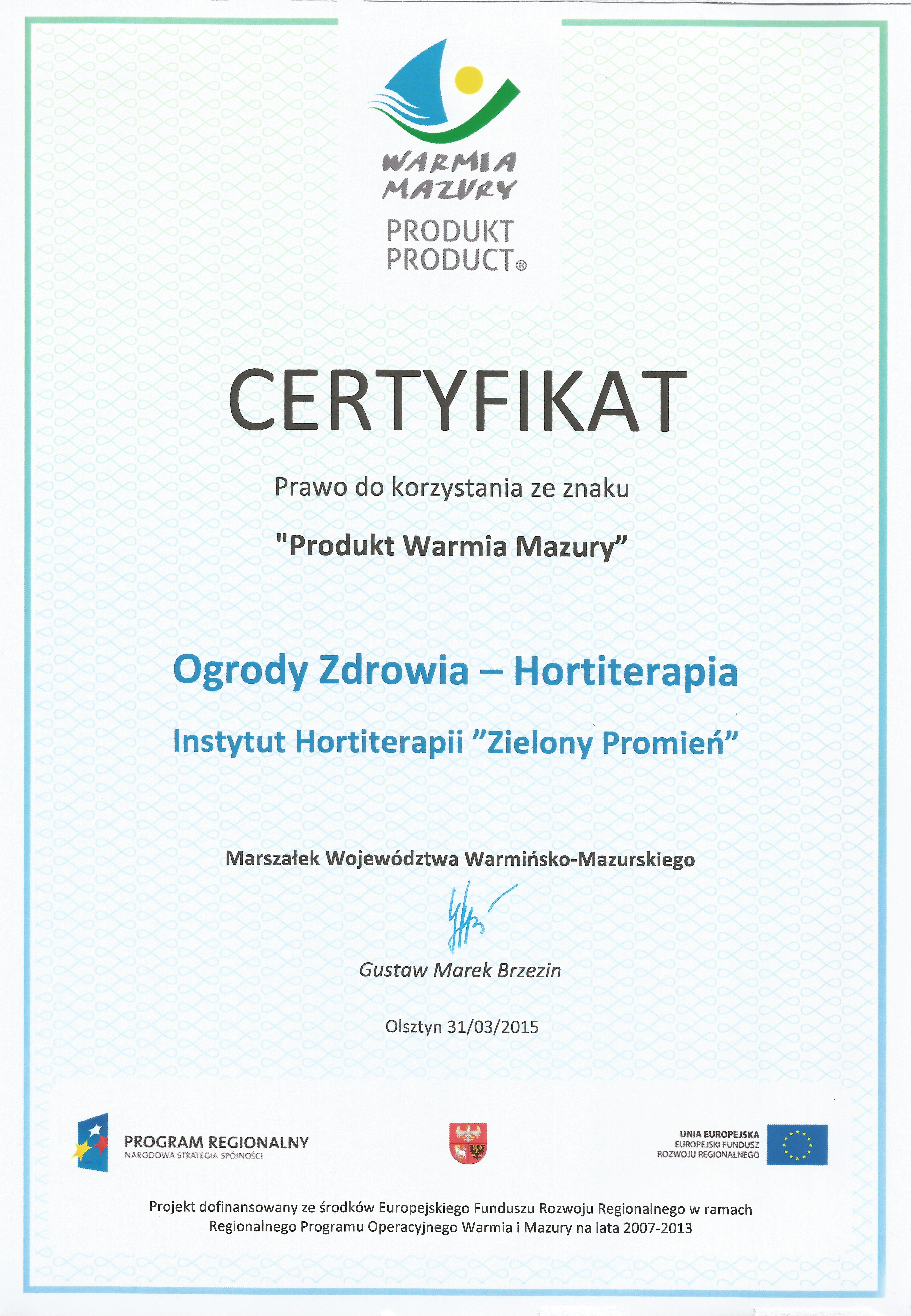 2015 Instytut Hortiterapii